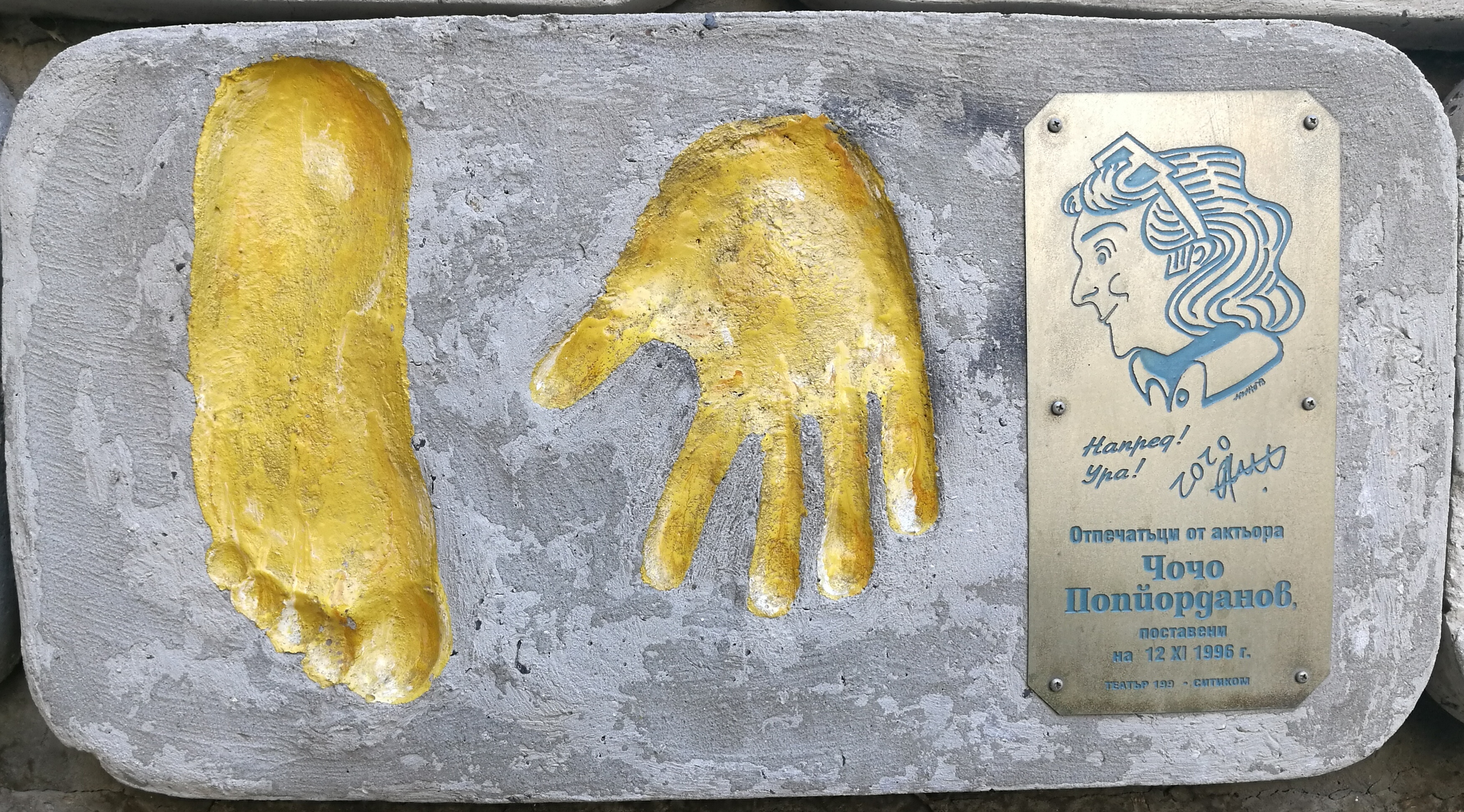 Стената на славата пред Театър 199 - пано с отпечатъци, послание и шарж на Петър (Чочо) Попйорданов.